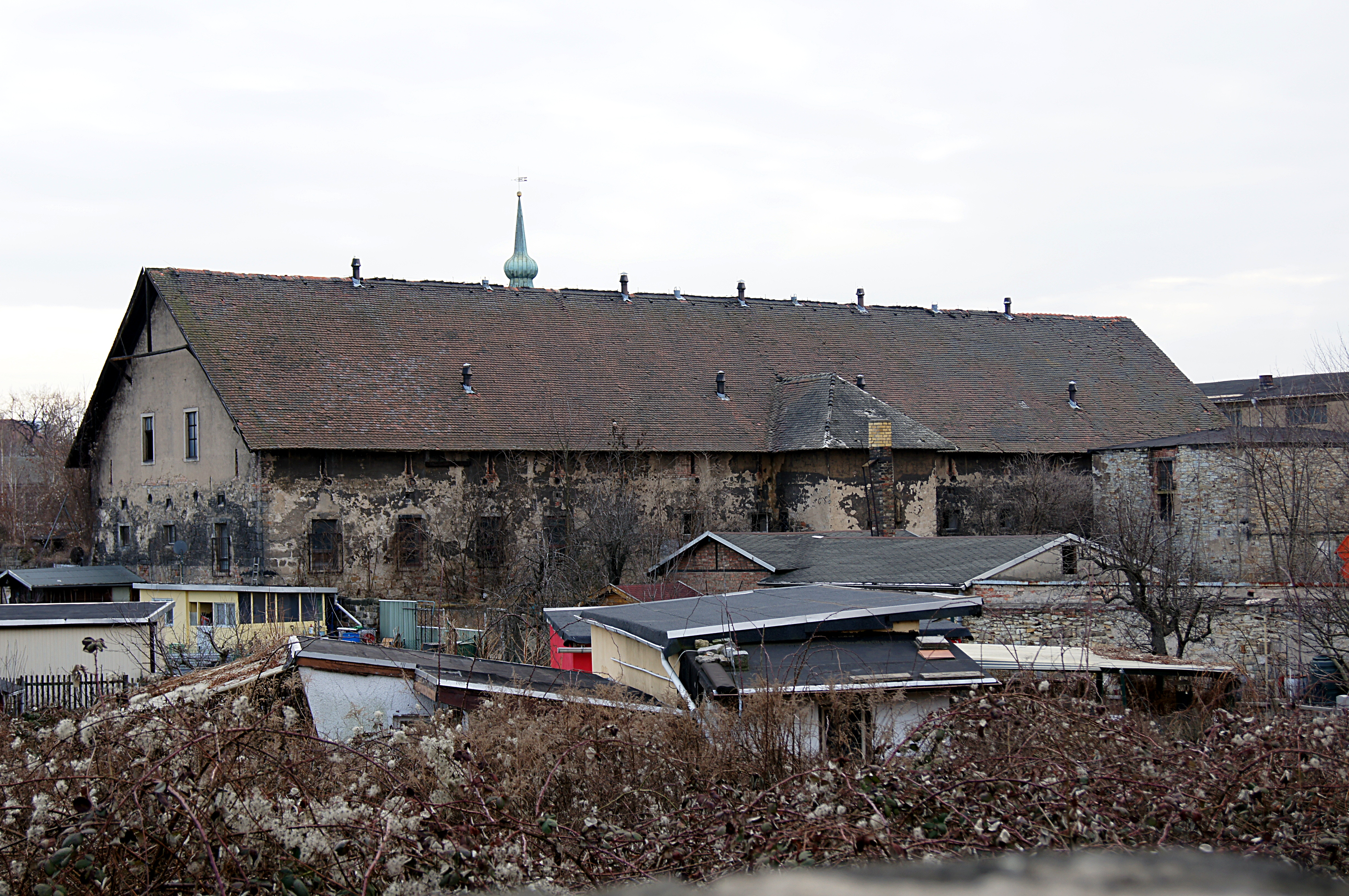 Reste des Ostravorwerkes u. Scheune; Friedrichstraße 60; von Magdeburger Straße her gesehen